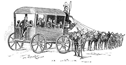 Pinocchio sale sul carro che porta al Paese dei balocchi. Illustrazione di Carlo Chiostri (1863 - 1939) dal libro di Collodi "Le avventure di Pinocchio", 1901